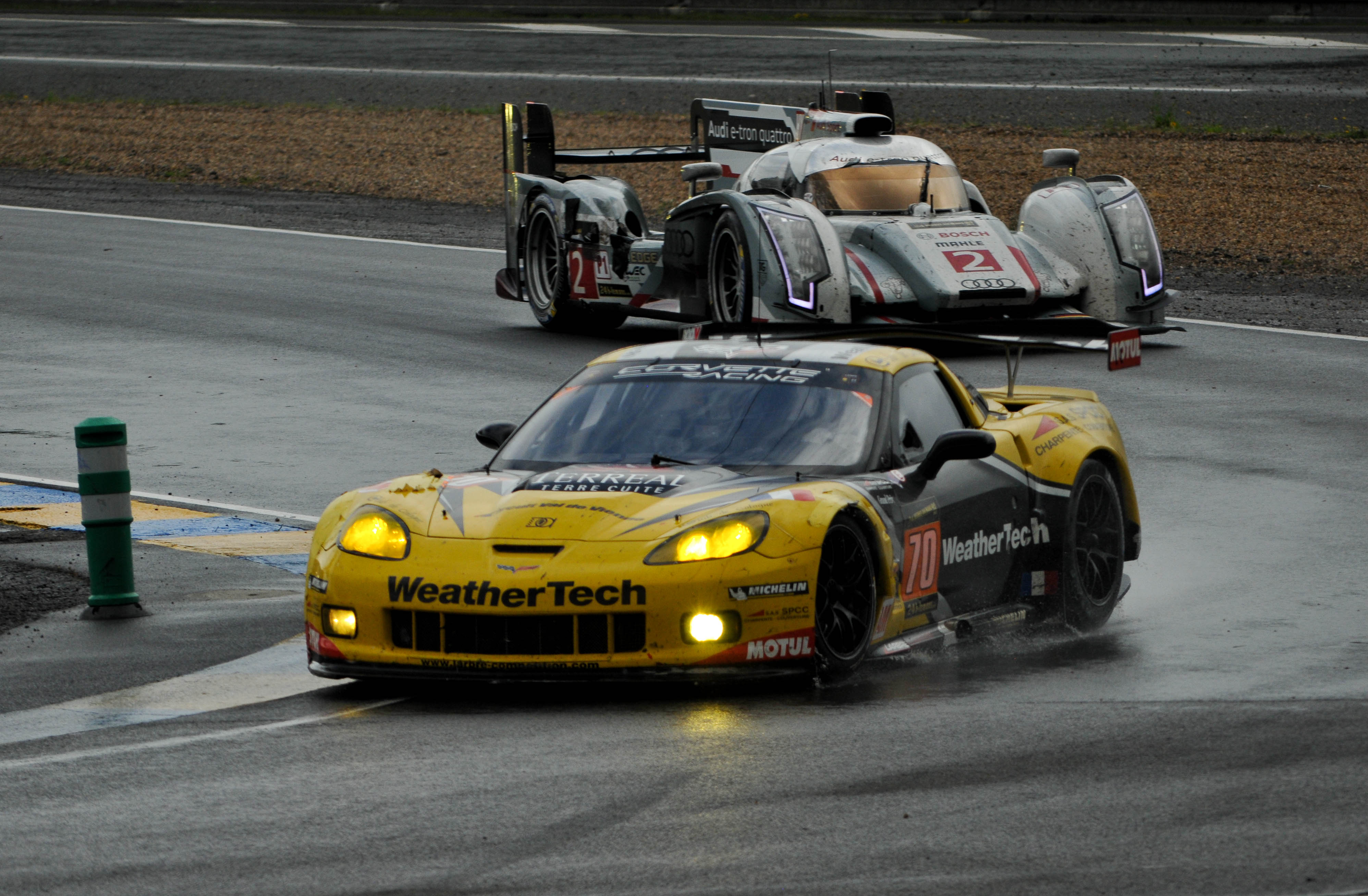 Le Mans 2013